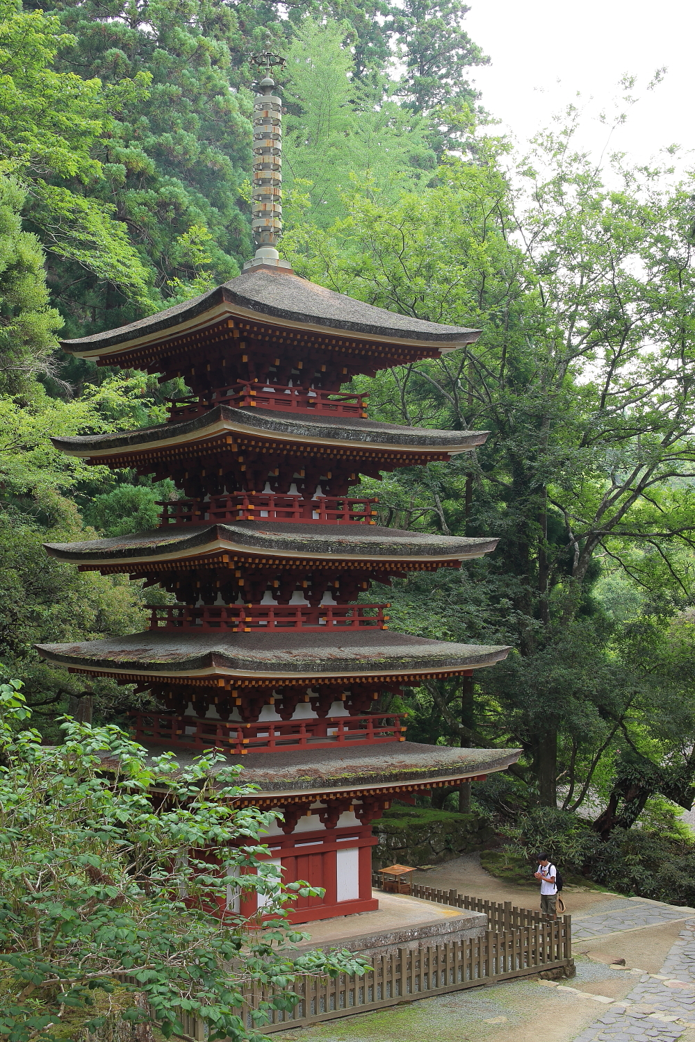 室生寺五重塔（2013年）